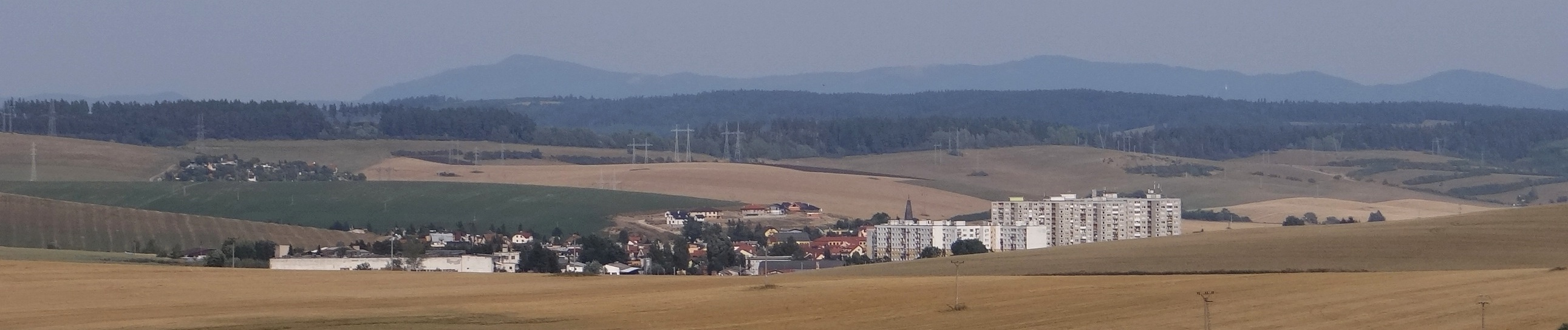 Smižany